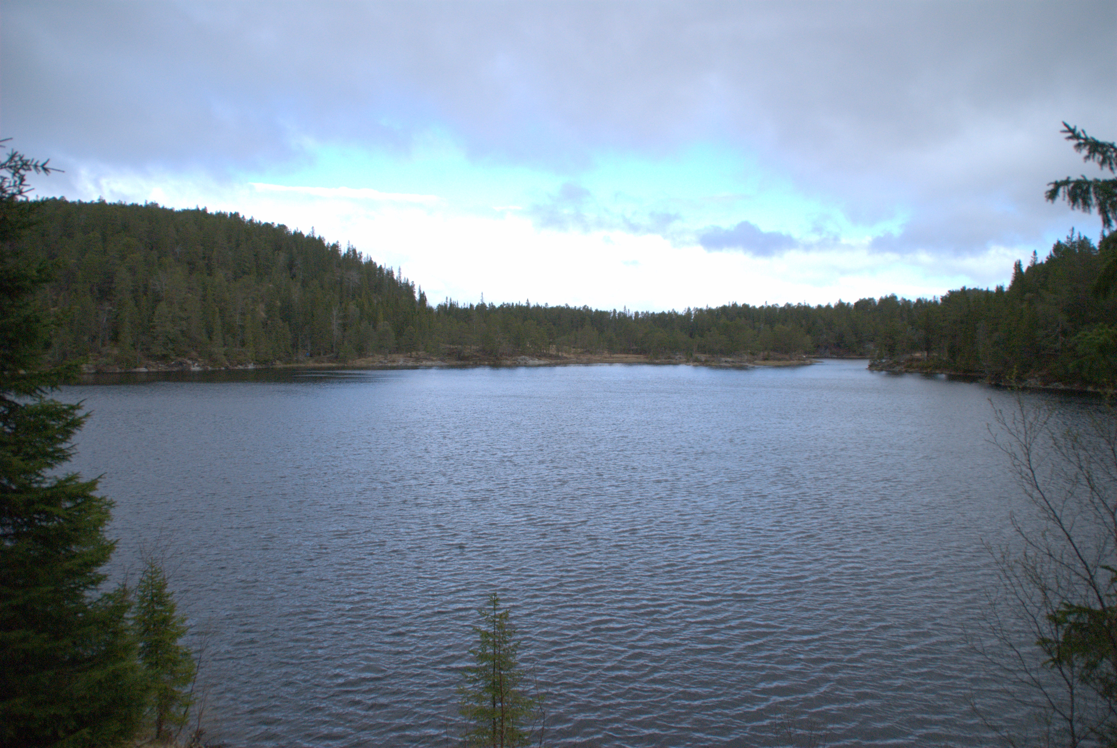 Kobberdammen i Bymarka ved Trondheim, Sør-Trøndelag.